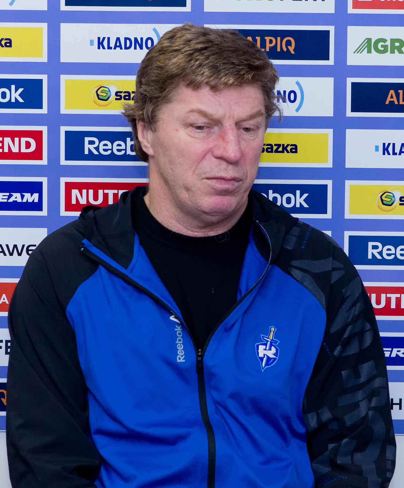 Jan Neliba; 2013-12-28; Kladno - Sparta 5:4 OT